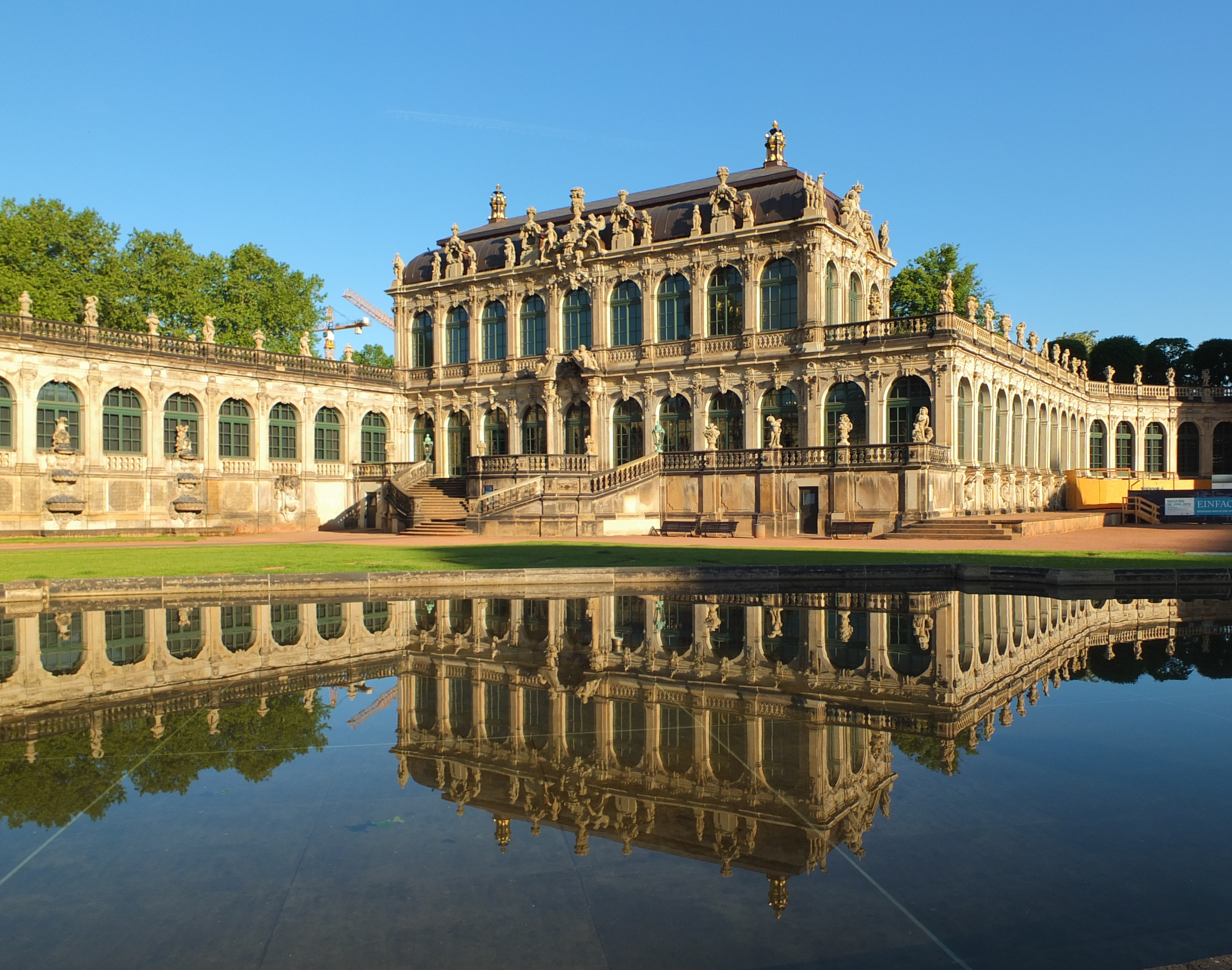 Mathematisch-Physikalischer Salon in the Zwinger musea in Dresden.